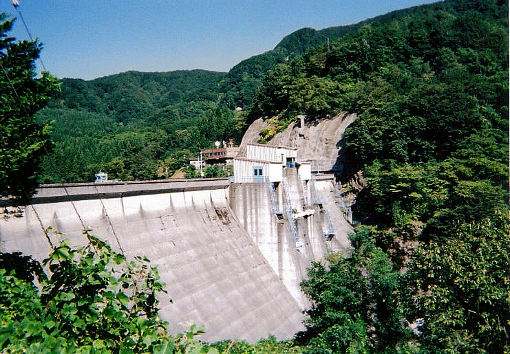 目屋ダム（青森県・岩木川。青森県管理）